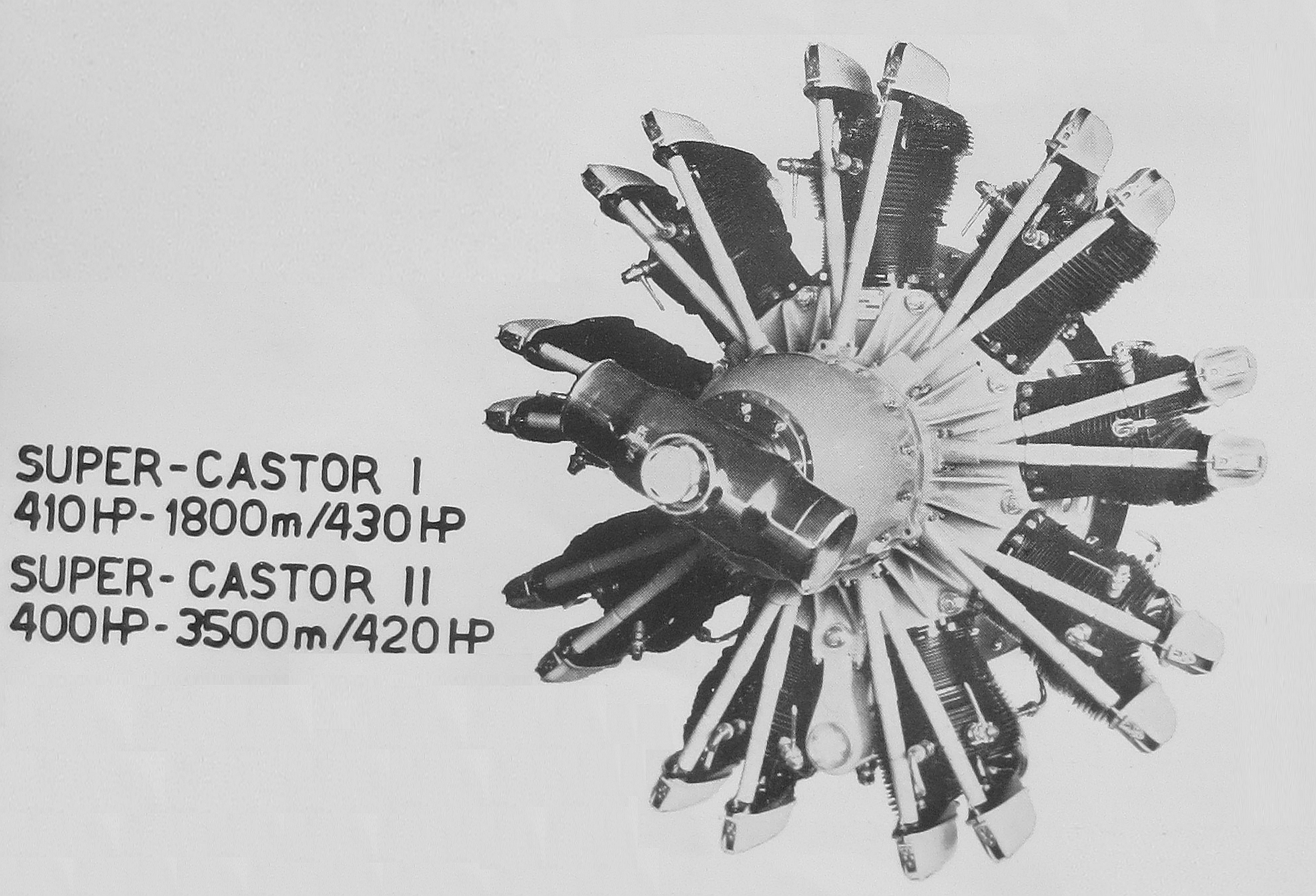 letecké motory Walter Super Castor I a II